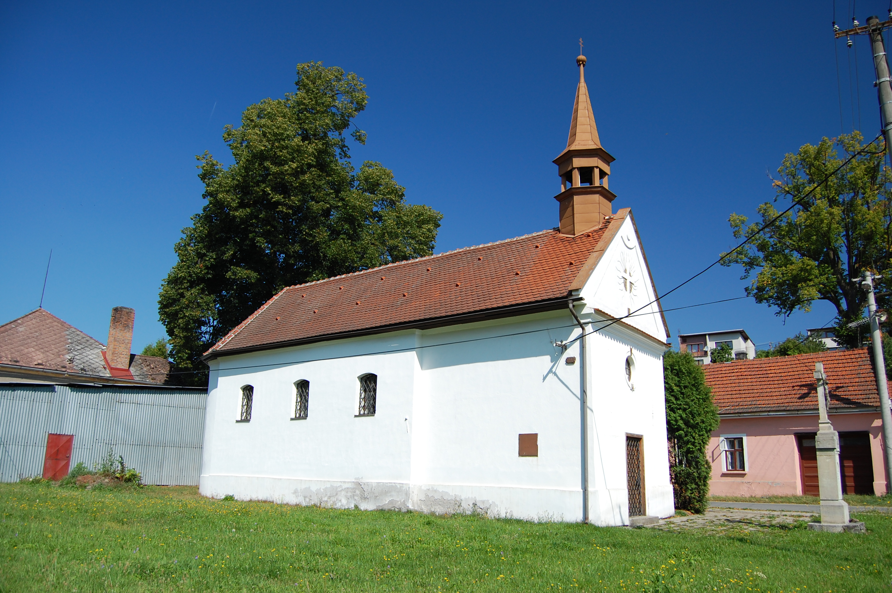 Kaplička svaté Anny - boční pohled, Ludmírov, okres Prostějov